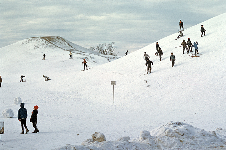 Skidåkare på högarna. Motiv: Uppsala högar Nyckelord: Raä-Fastigheter, Riksintressen, Vintermotiv Kategori: Hög Skidåkare på högarna.